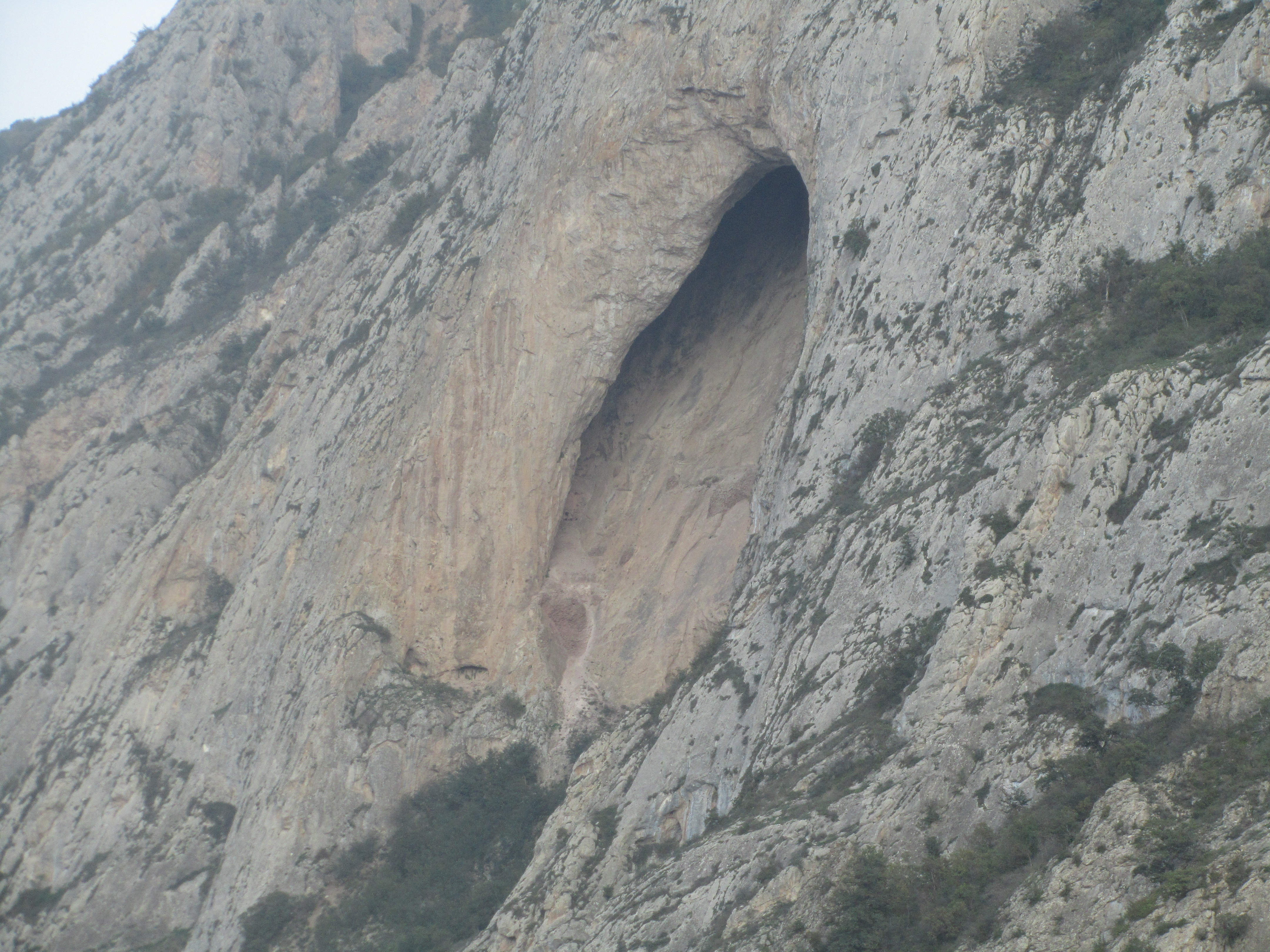 غار اسپهبد خورشید